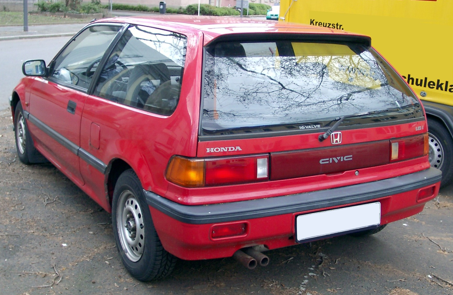 Honda Civic, 4. Generation